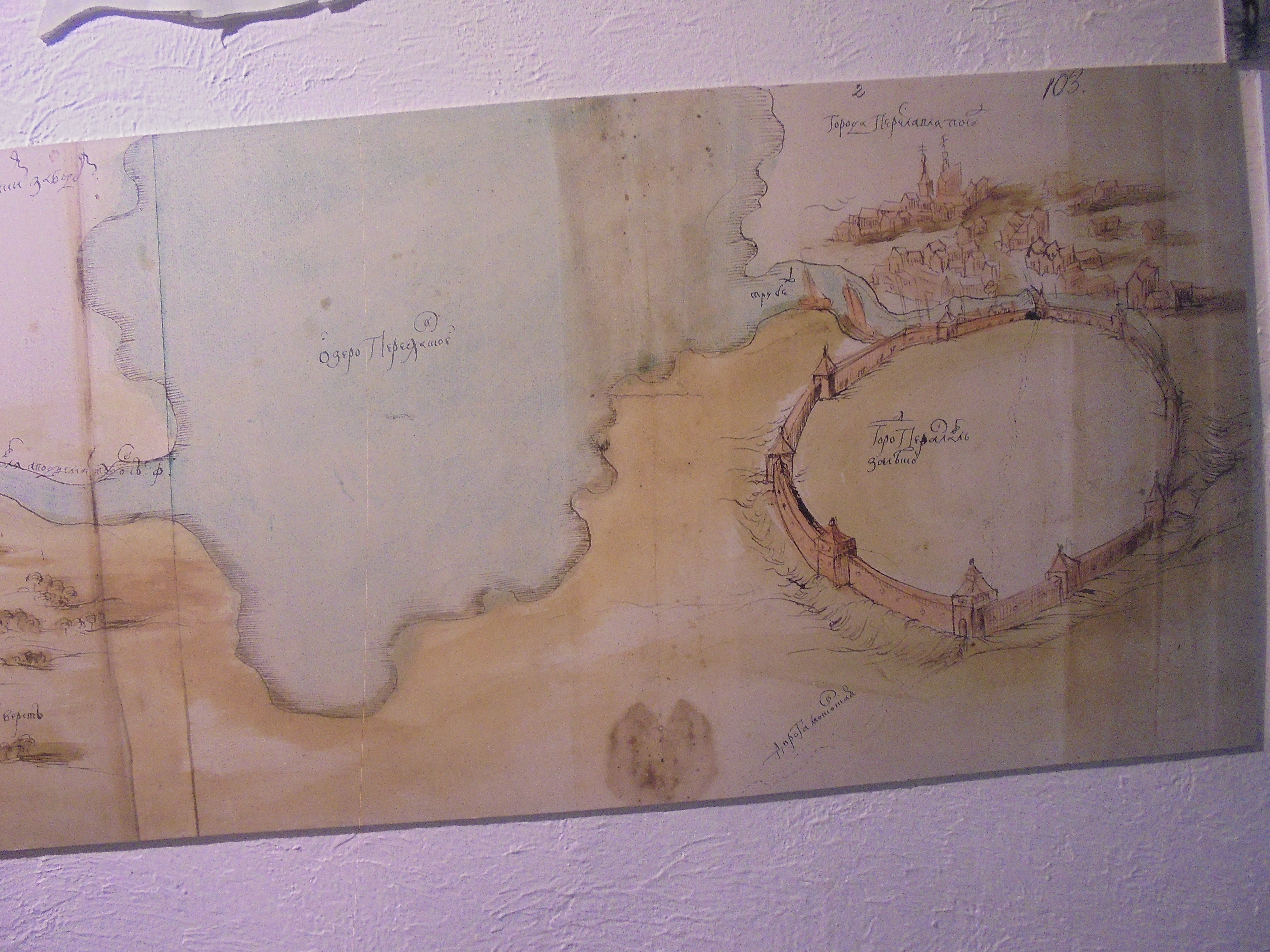 Карта